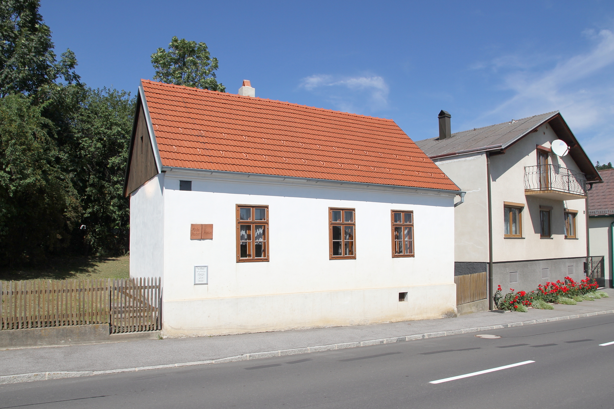 Das denkmalgeschützte "Mida Huber-Haus"; ehemaliges Wohnhaus und Arbeitsraum der Mundartdichterin sowie Künstlerin Mida Huber und aktuell (2012) als Museum genutzt.